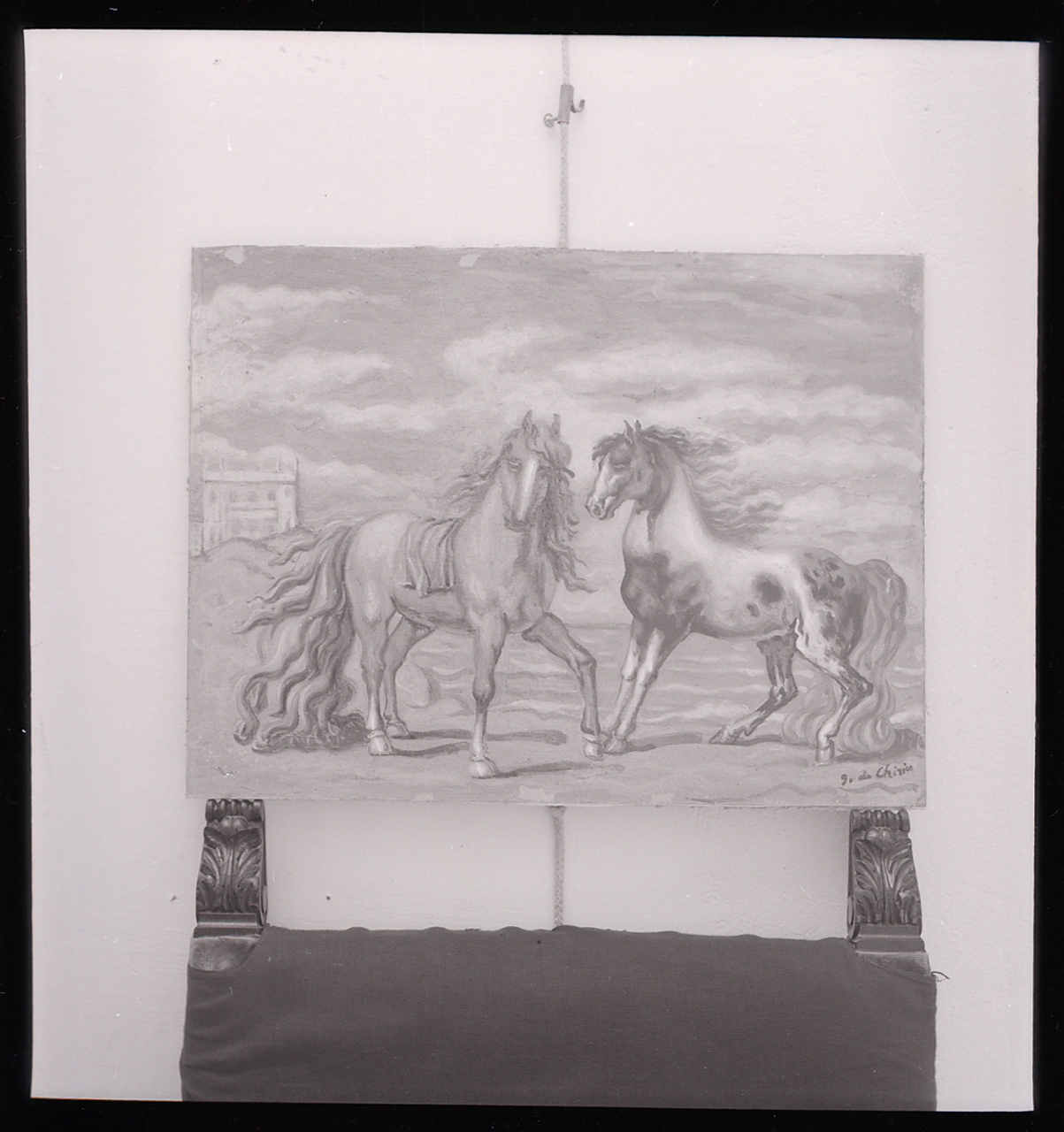 Milano. Galleria Montenapoleone 6/A. Giorgio De Chirico, Cavalli, dipinti. Giorgio Morandi, Nature morte, dipinti. Massimo Campigli, Donna, dipinto. Servizio fotografico : Milano, 1960 / Paolo Monti. - Buste: 3, Fototipi: 6 : Negativo b/n, gelatina bromuro d'argento/ pellicola ; 6x6. - ((Serie costituita da 3 buste di negativi identificati con i nn.: 14538, 14539, 14540, 14541, 14542, 14543, e tenute insieme con da una graffetta. - Sulla busta identificata con la numerazione 14538/39 iscrizione didascalica manoscritta a penna: "Morandi - Campigli/ De Chirico( (Gall. Montenapoleone 6/A)". - Le buste identificate contengono 2 negativi ciascuna non identificabili singolarmente. - Occasione: Documentazione della mostra allestita alla Galleria d'arte Montenapoleone 6/A